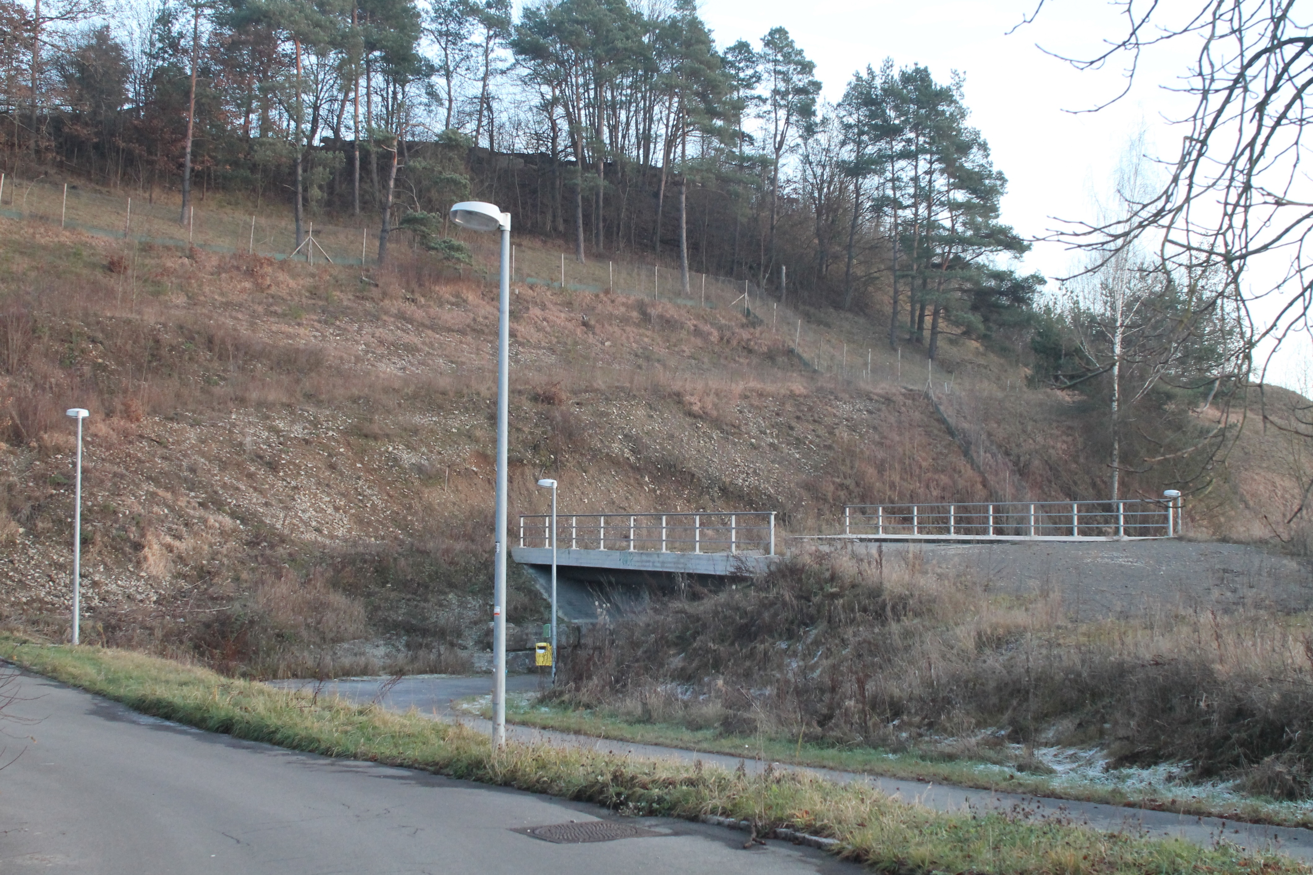 Brücke der geplanten Umgehungsstrasse von Darmsheim.